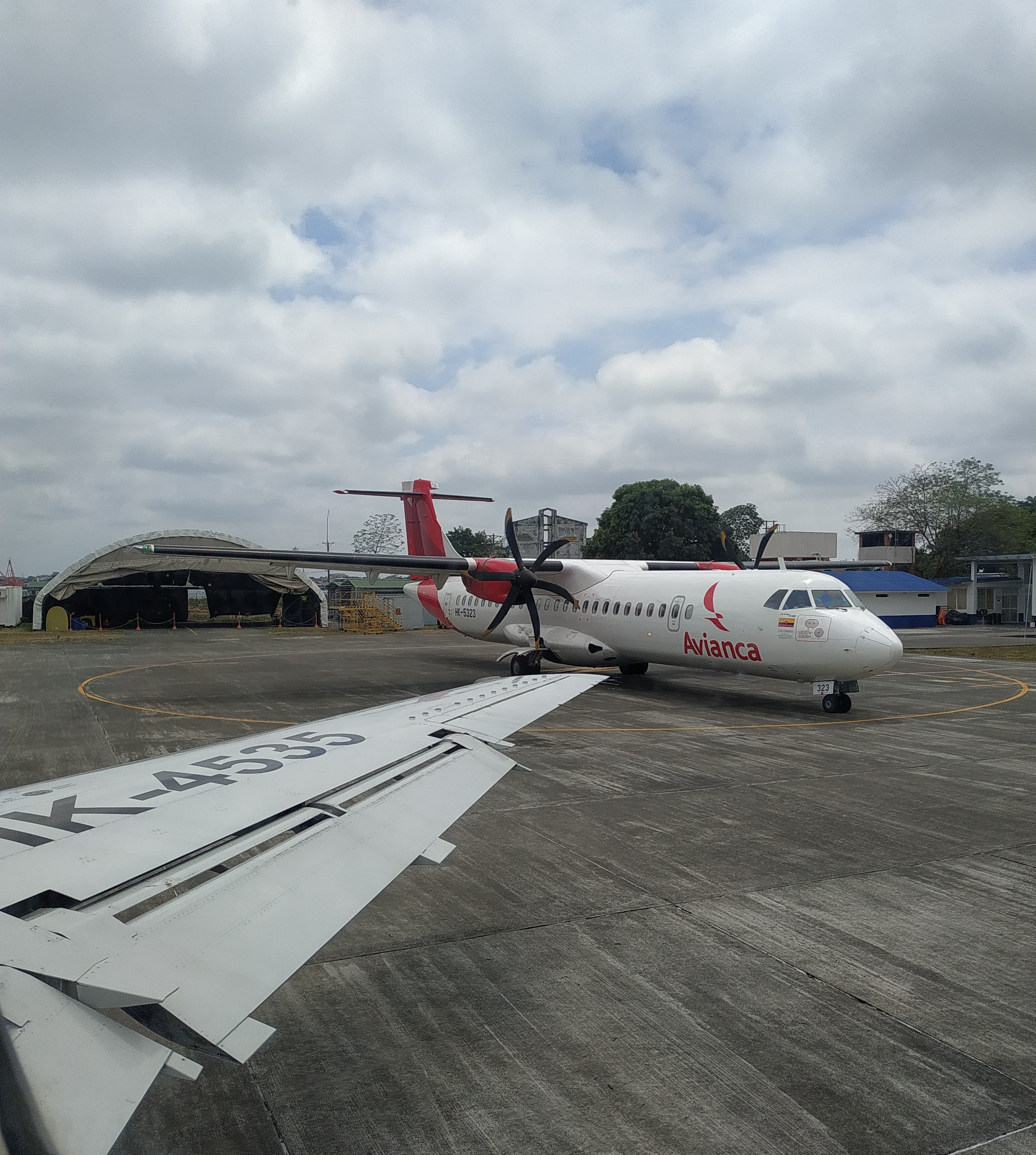 Vista de el Atr 72 de Avianca desde el Embraer ERJ 145 de Satena en el Aeropuerto La Florida